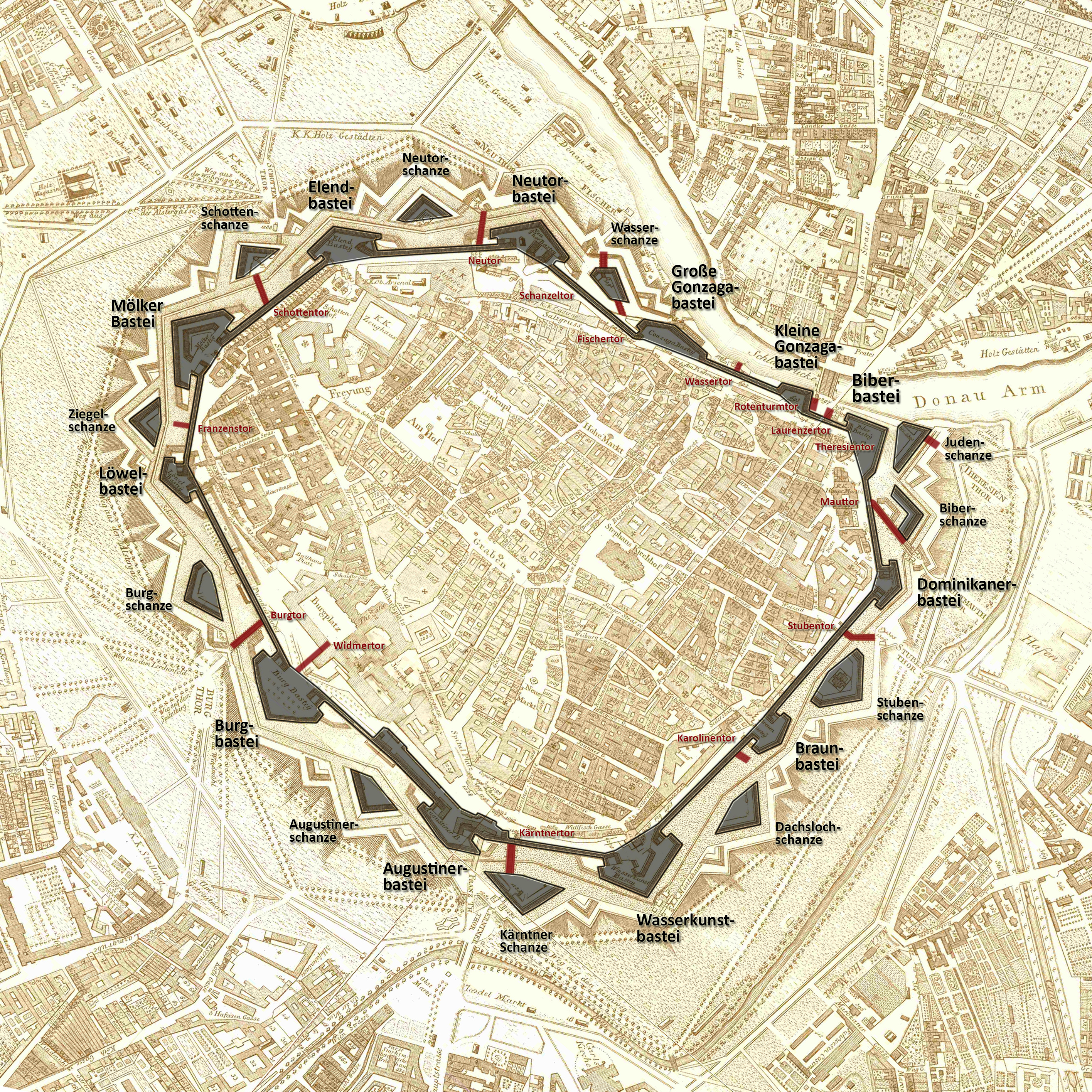 Wiener Stadtbefestigung, Basiskarte: „Grundriß der Haupt- und Residenzstadt Wien“, J. V. Degen 1809, Grafik: user:Gugerell